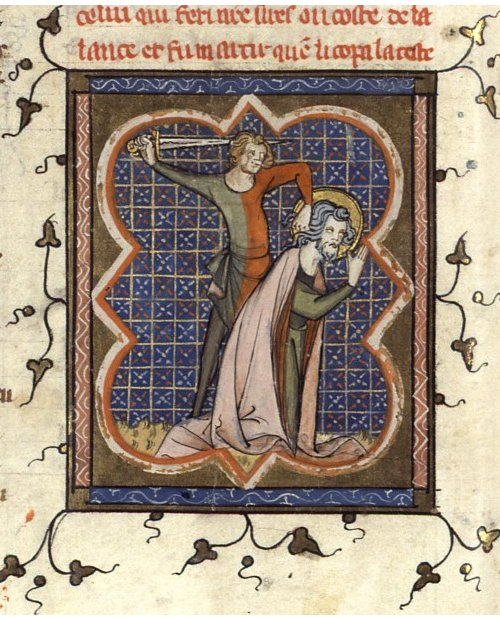 Martyre de saint Longin. Cote : Français 185 , Fol. 88v . Vies de saints, France, Paris, XIVe siècle, Richard de Montbaston et collaborateurs.